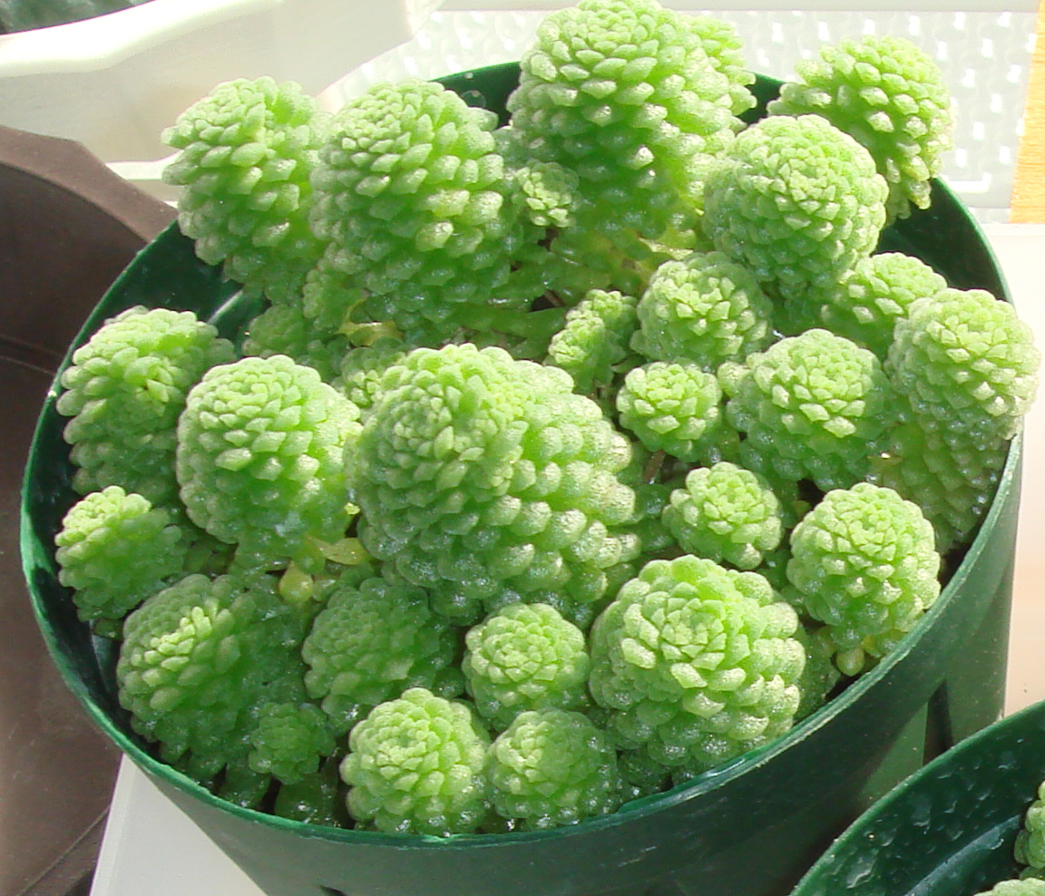 モナンテス・ポリフィラ